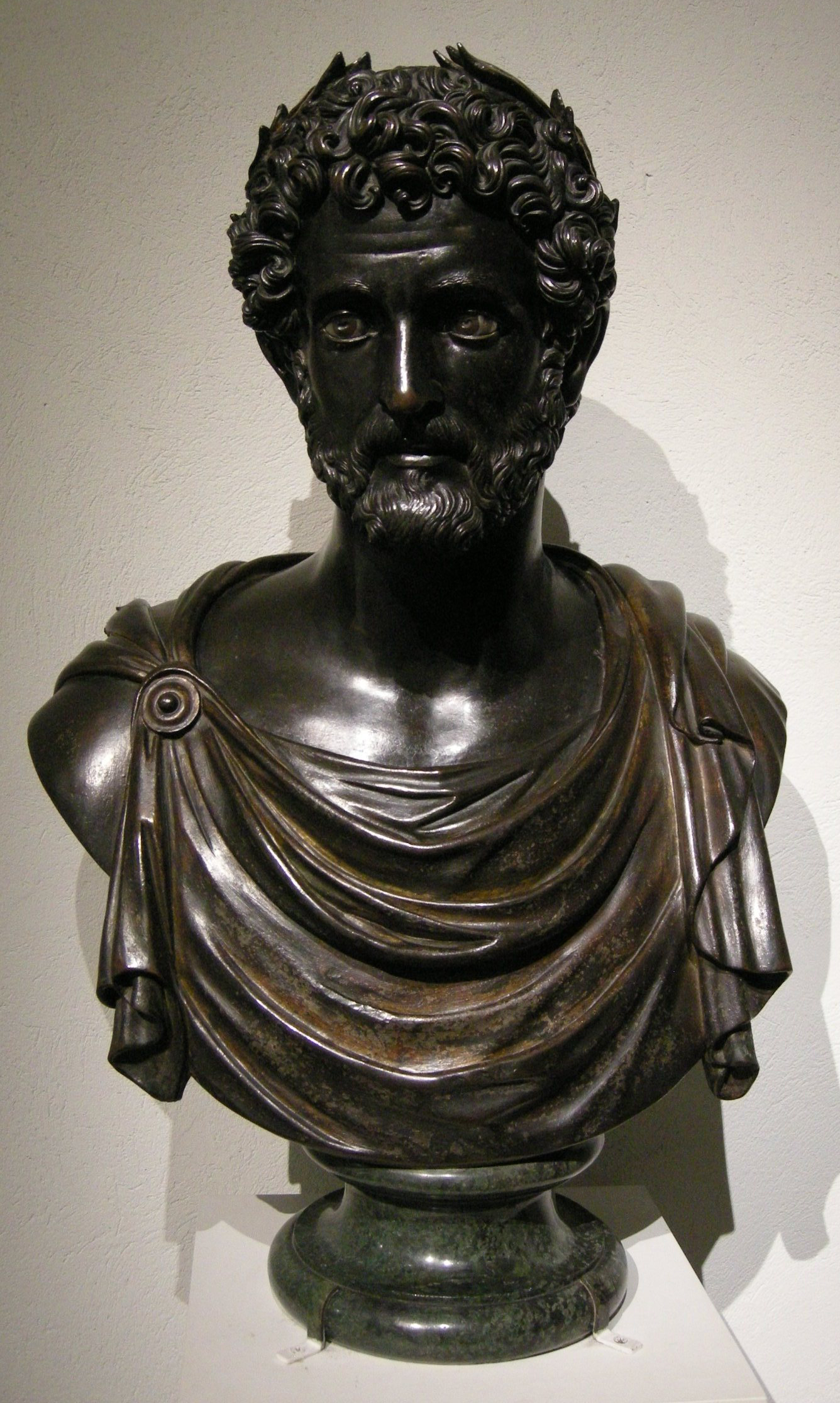 L'antico, antonino pio, 1524 circa